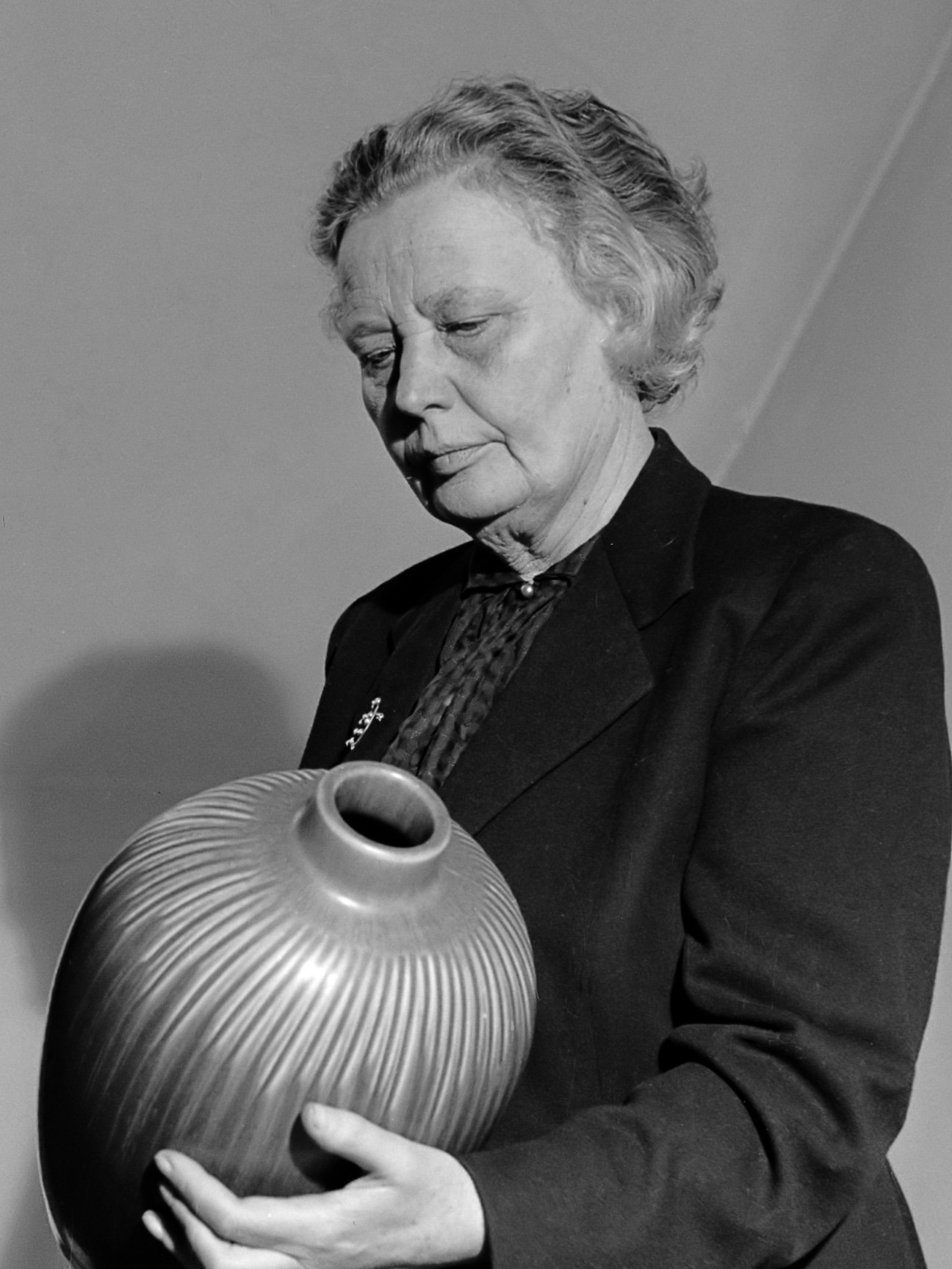 Pottenbakkerij Saxbo. Nathalie Krebs en een onbekende man bekijken een vaas maart 1954